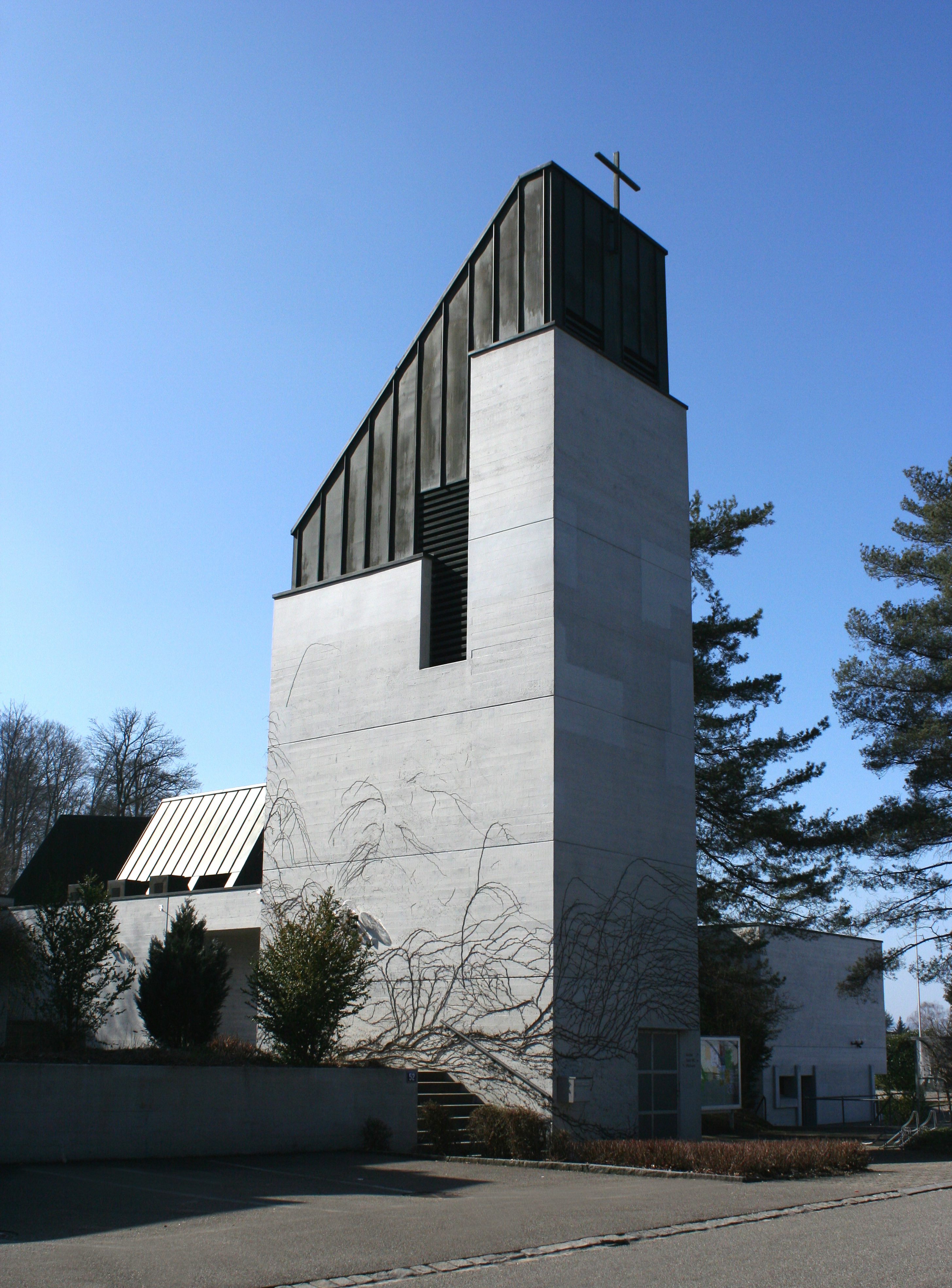 Römisch-katholische Pfarrkirche St. Martin Seuzach